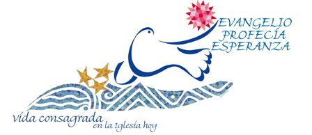 Año vida Consagrada